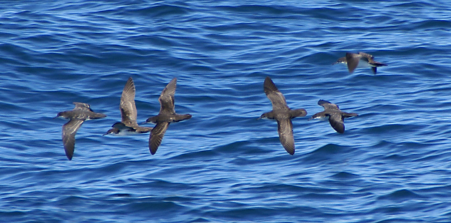 Galapagos Shearwaters Puffinus subalaris, Galapagos Islands